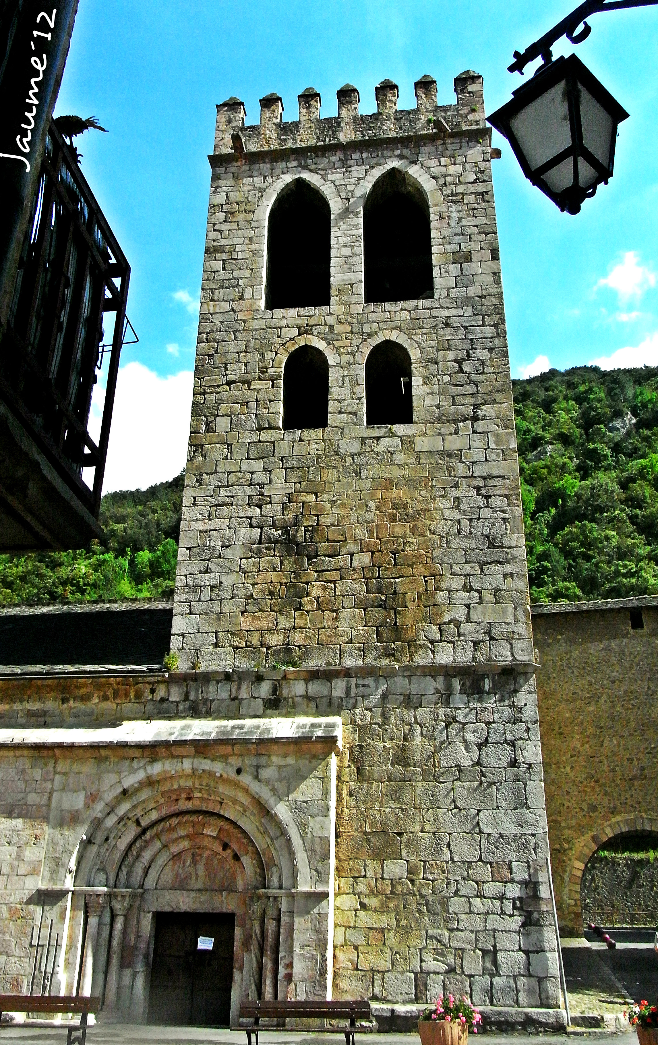 Església de Sant Jaume (Vilafranca de Conflent) .